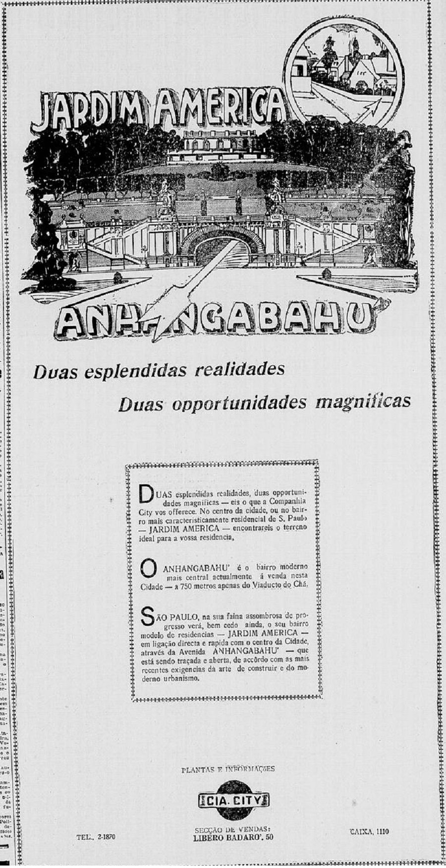 Anúncio publicitário da Companhia City sobre loteamentos situados no entorno da Avenida Anhangabaú (atual Nove de Julho), então em construção. Destaque para o túnel projetado (e nunca construído) pelo arquiteto Cristiano Stockler das Neves.